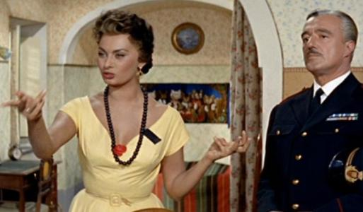 Sofia Loren e Vittorio De Sica nel film "Pane amore e..." di Dino Risi del 1955